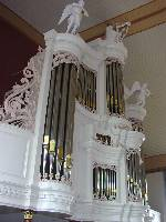 Het kerkorgel van Vaassen van de linkerzijde bekeken